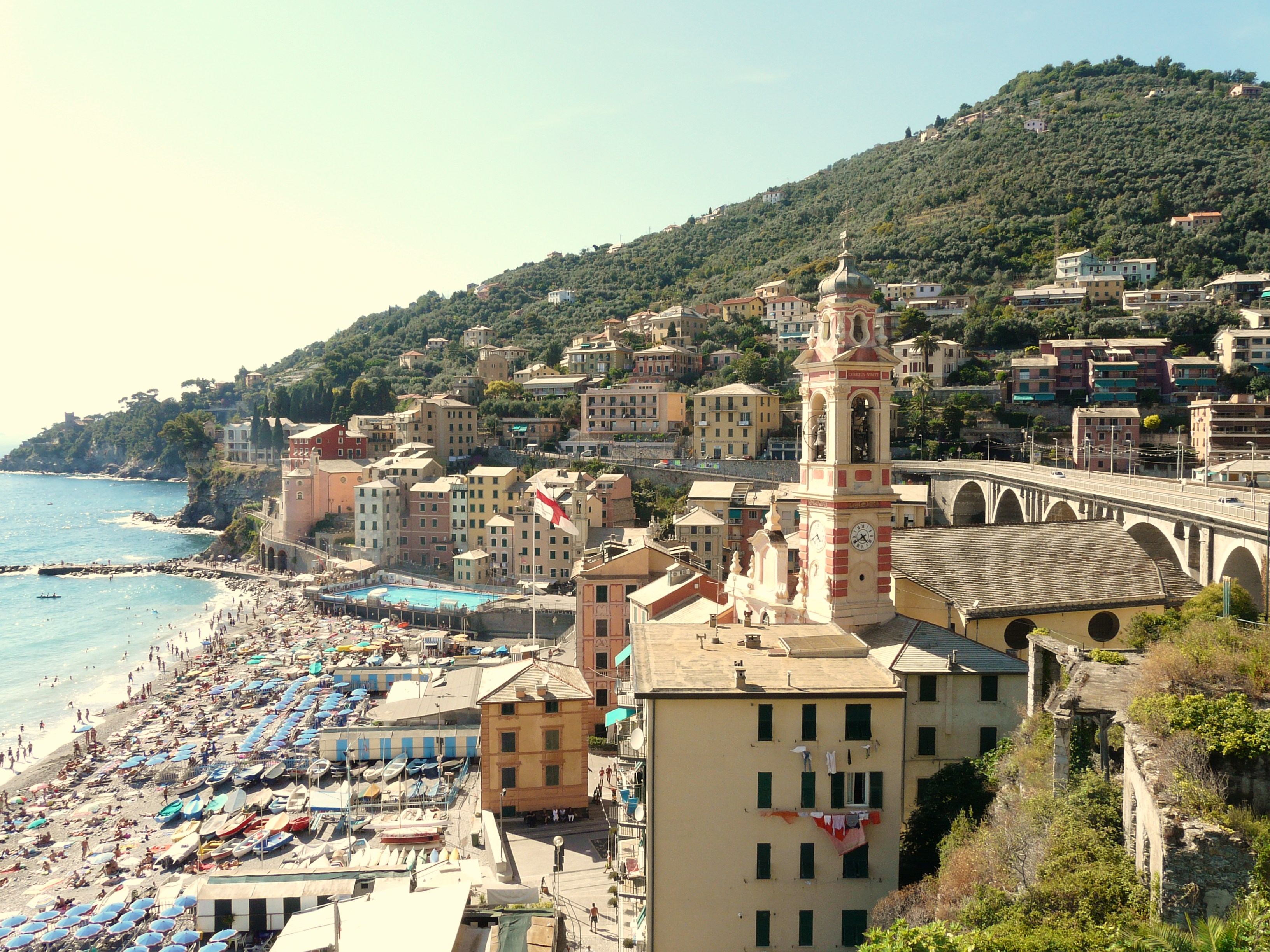 Panorama vvhvjvjvugh di Sori, Liguria, Italia